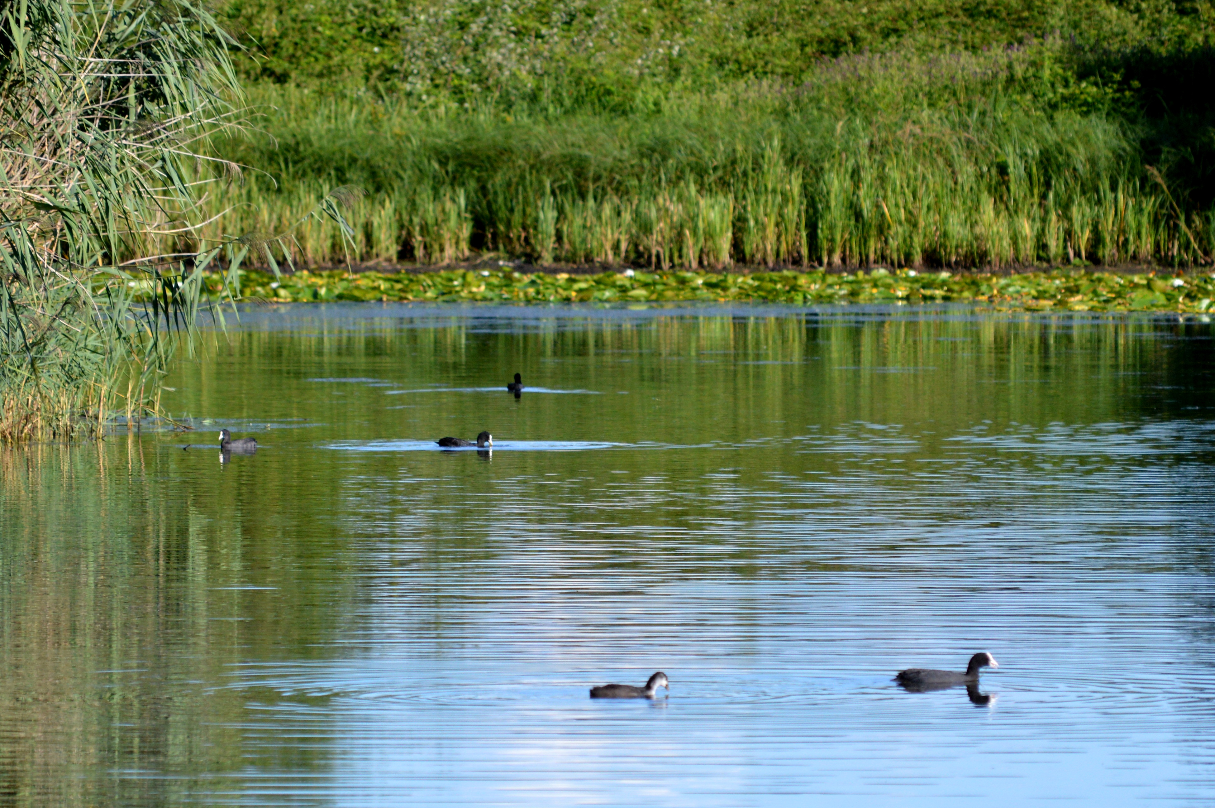 Foulques macroules et canards nageant sur l'étang du Creux des Renards, dans la commune français de Noironte.